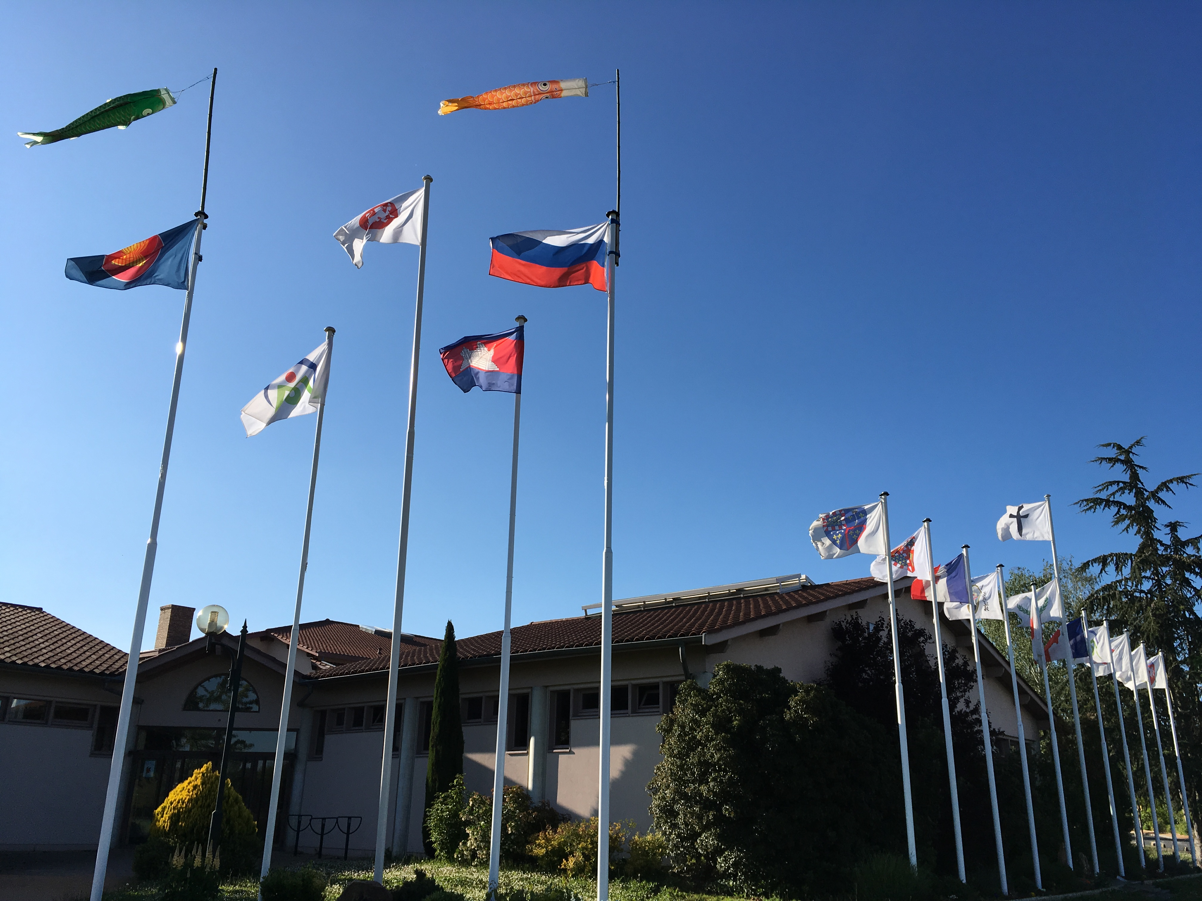 Depuis le 8 septembre 2014, flotte noblement tapissé de toiles l'histoire rappellée sous l’égide de ces 15 mats et de ces 16 drapeaux.